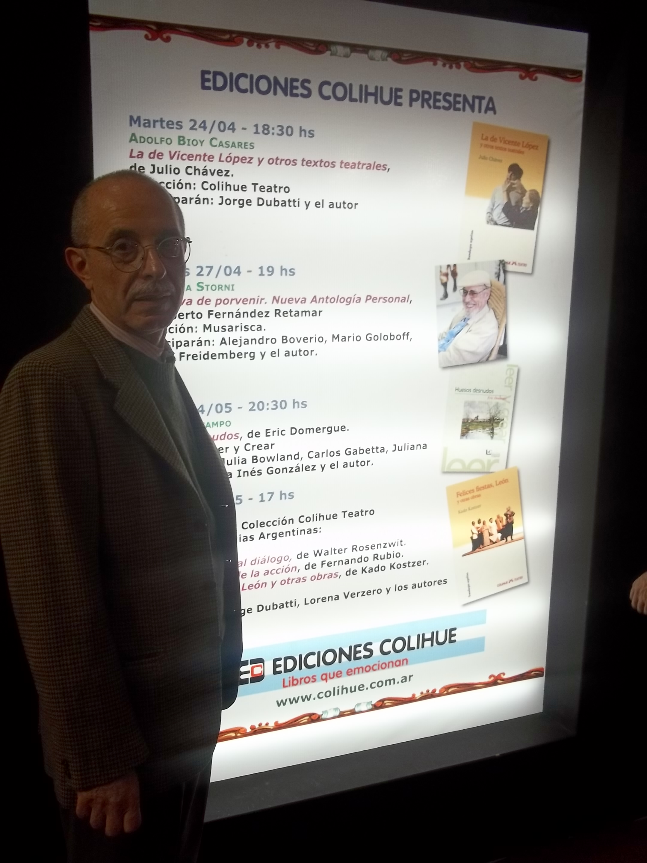 Kado Kostzer en la Feria del Libro 2012 de Buenos Aires donde presento su nuevo libro